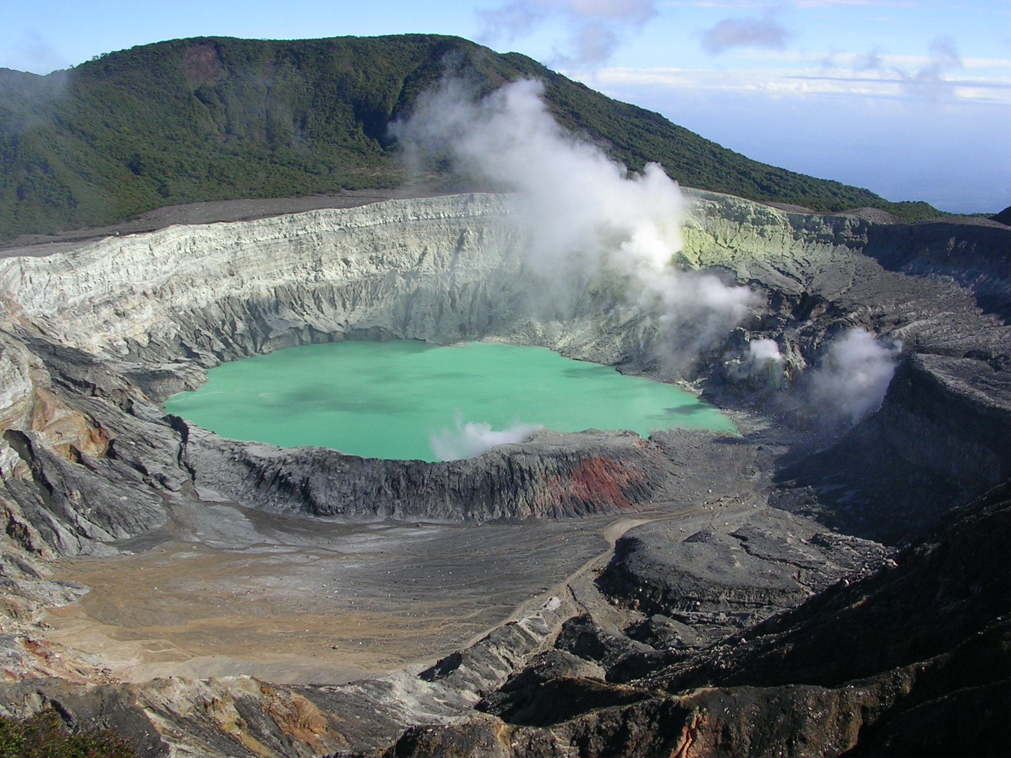 Vulkan Poas, Costa Rica